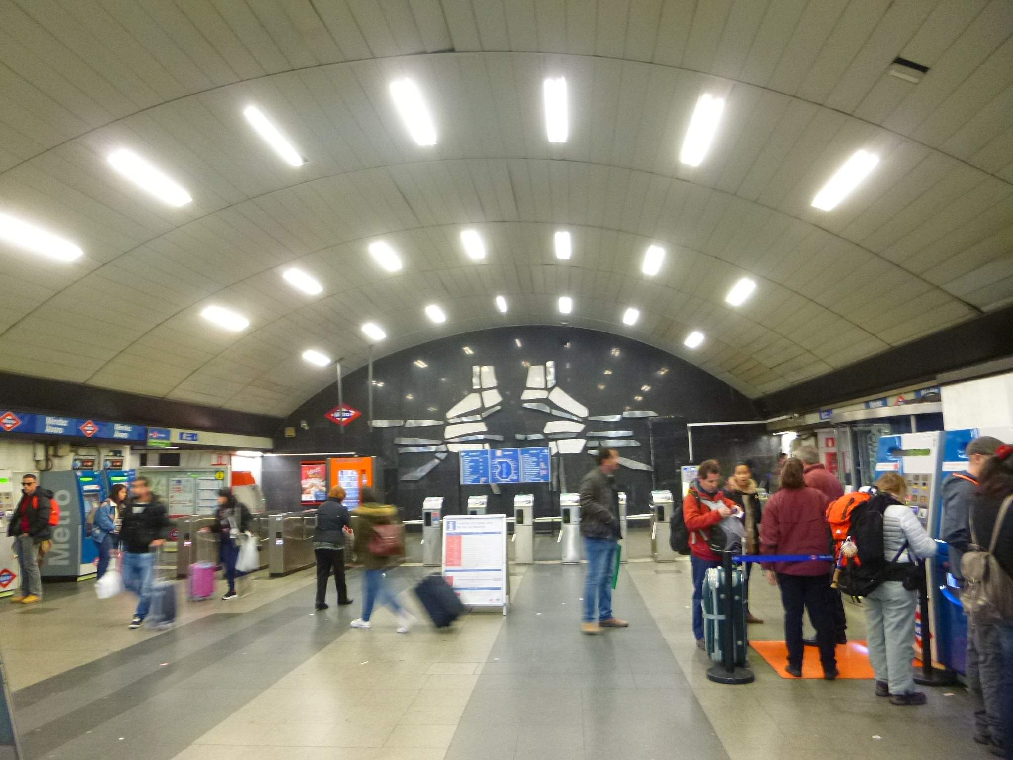 Madrid - Estación de Metro de Méndez Álvaro